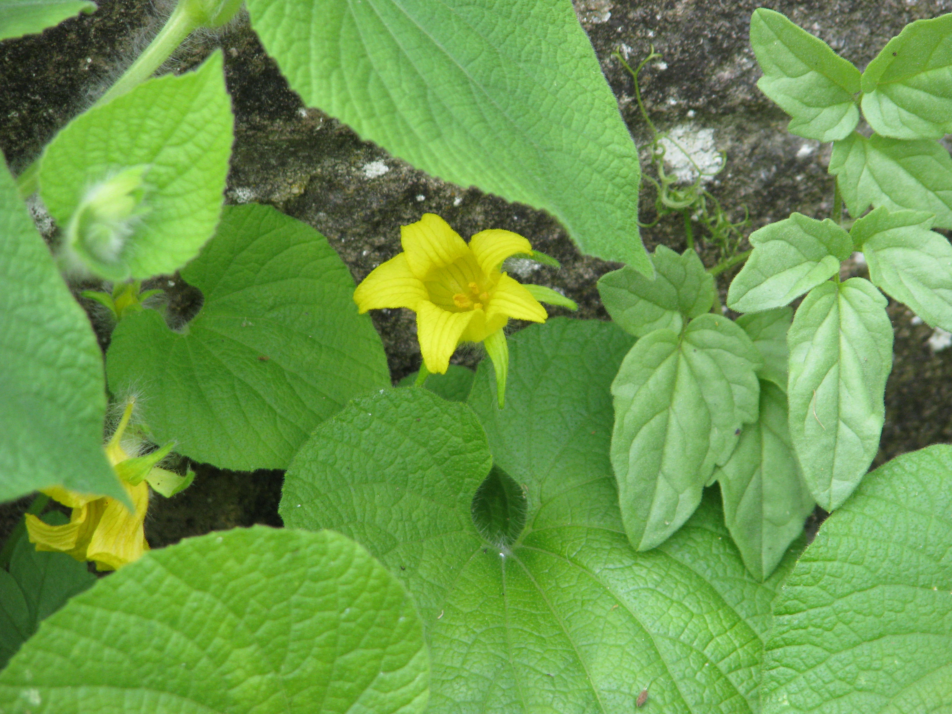 Thladiantha dubia